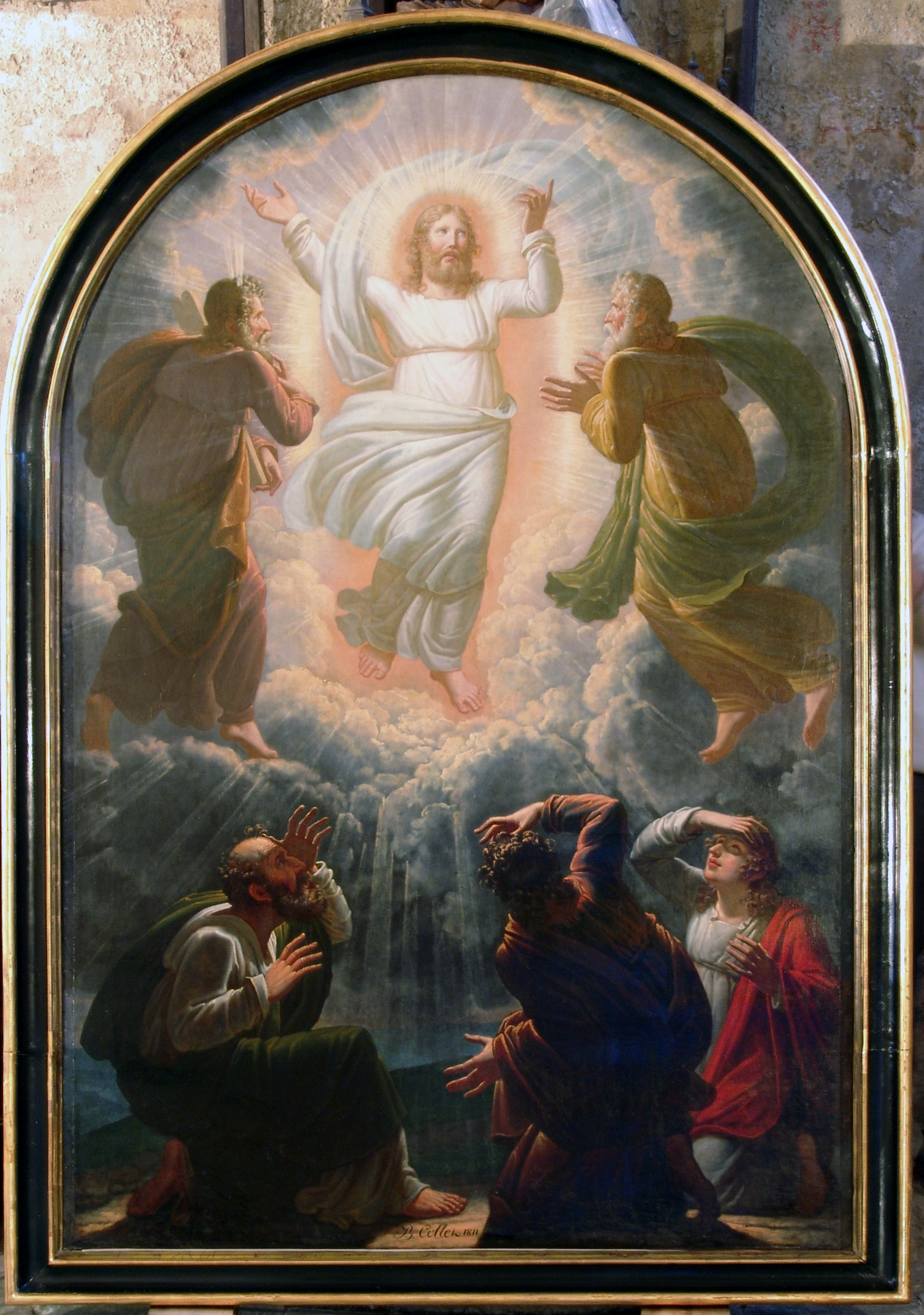 Peinture XIXe siècle